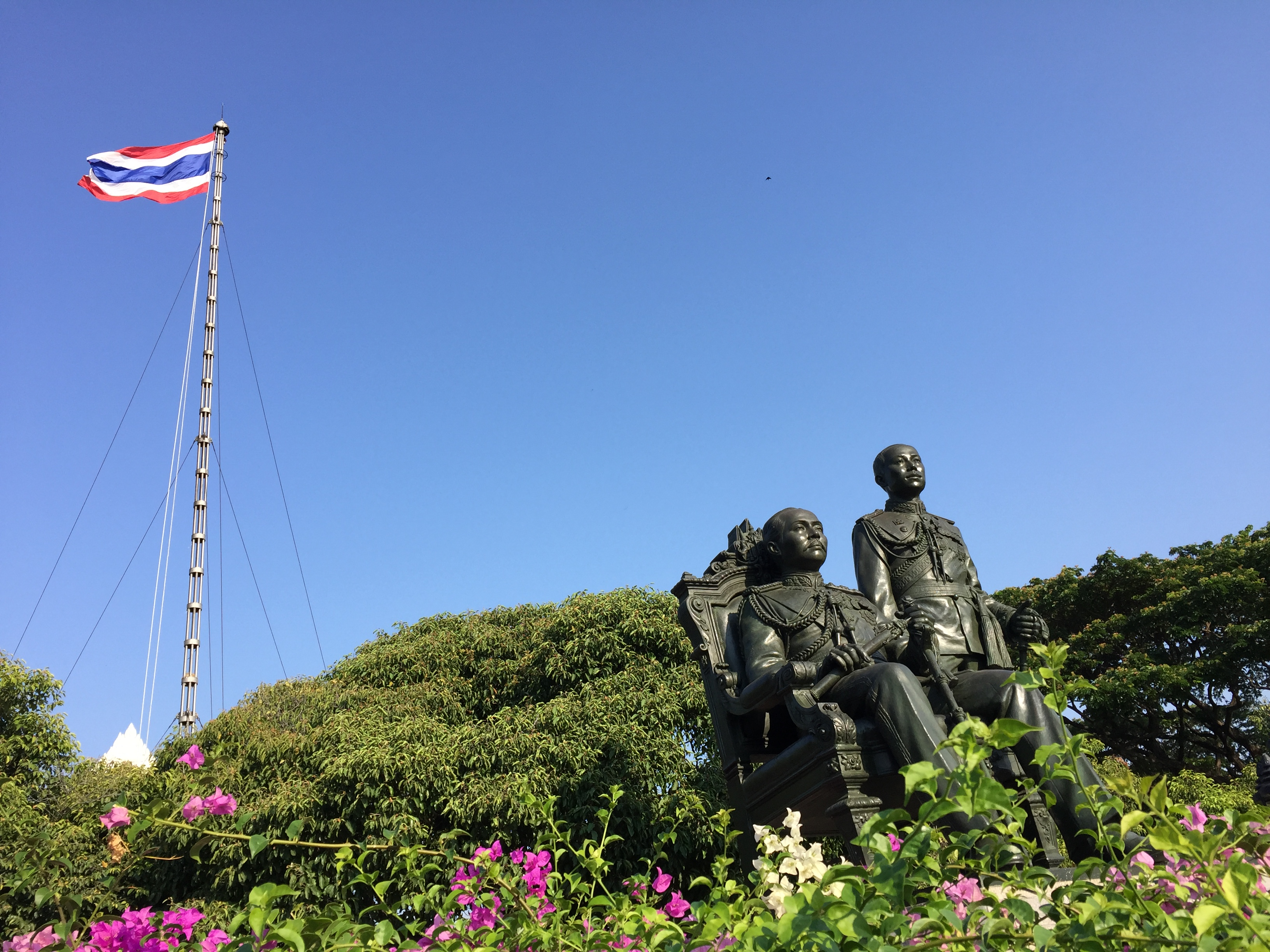 พระบรมราชานุสาวรีย์สองรัชกาลด้านหน้าเสาธงจุฬาลงกรณ์มหาวิทยาลัย